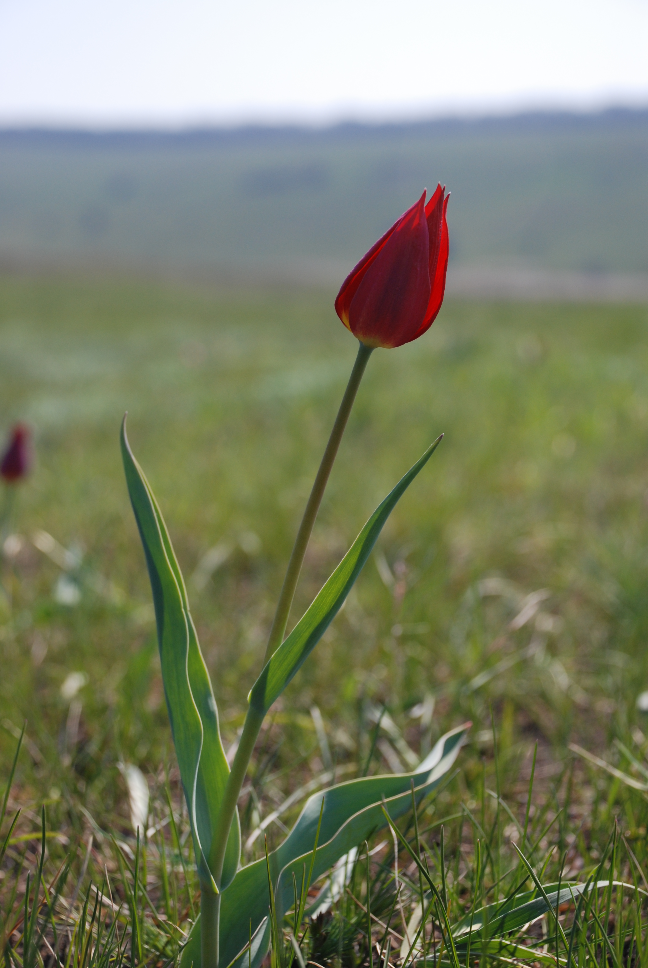 Балка Березова, Міловський район, на південь від с. Журавське на схід